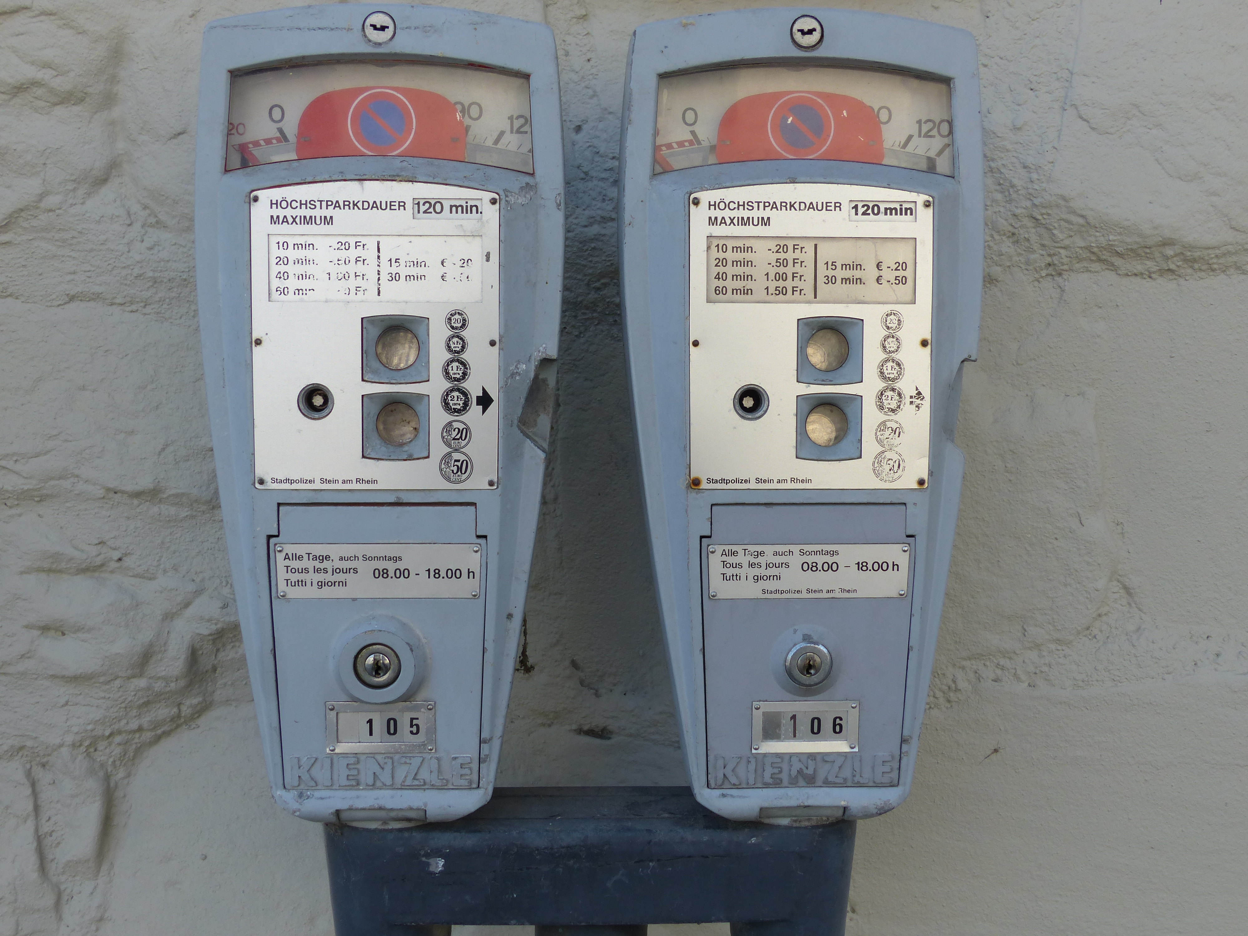 Kienzle Parkuhren, Stein am Rhein (CH).